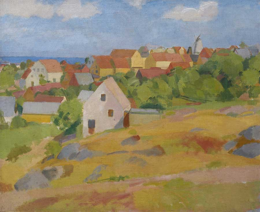 View over Gudhjemlabel QS:Len,"View over Gudhjem"